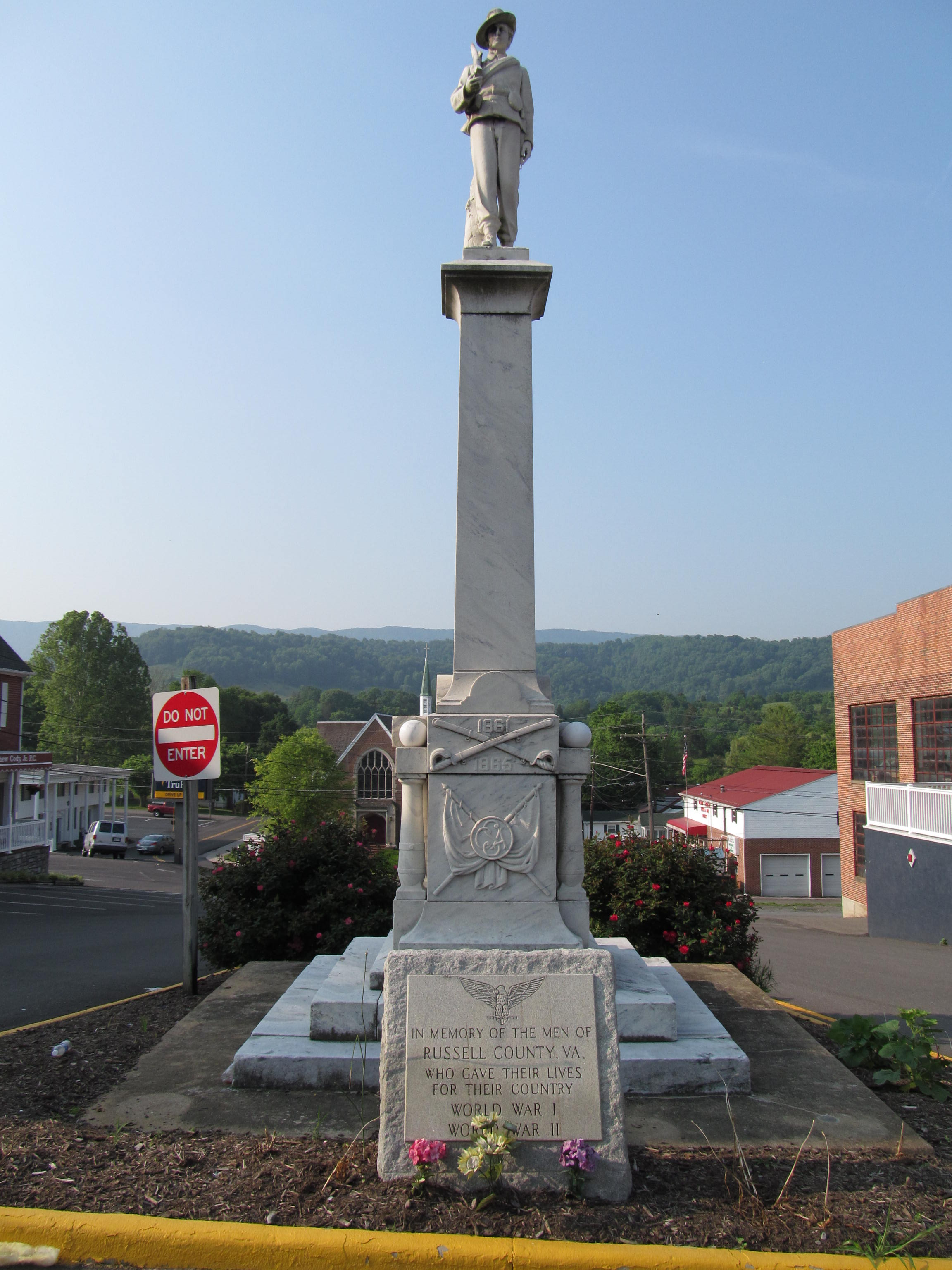 Lebanon, Virginia